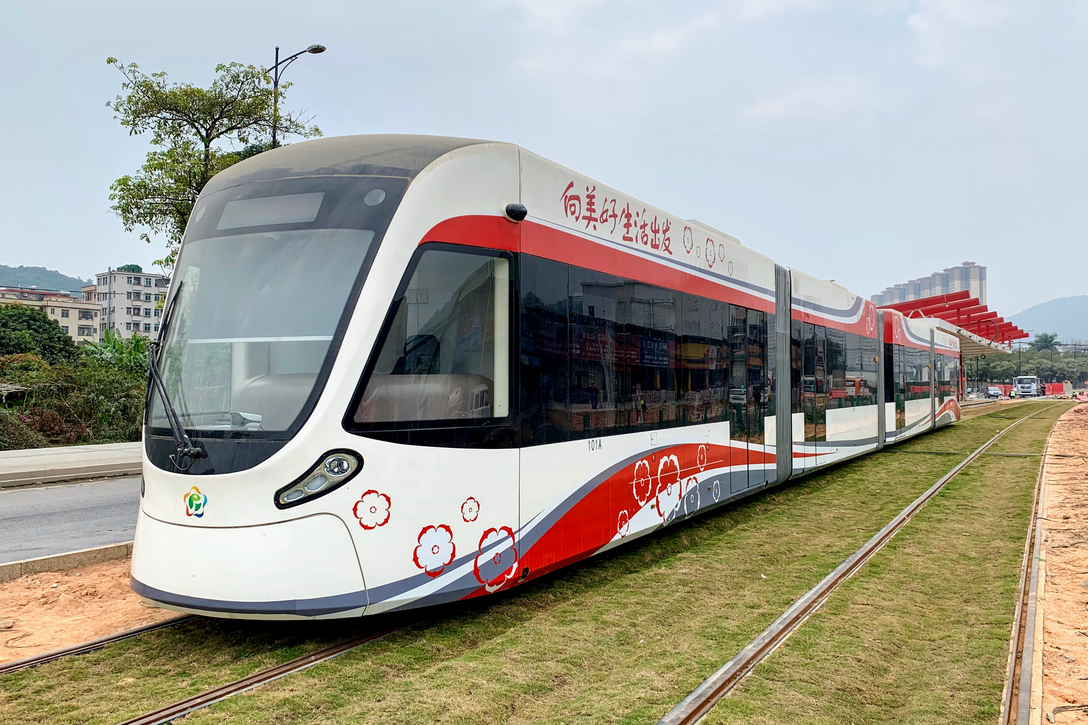 黄埔有轨电车1号线的首列电车（空载试验首发车）